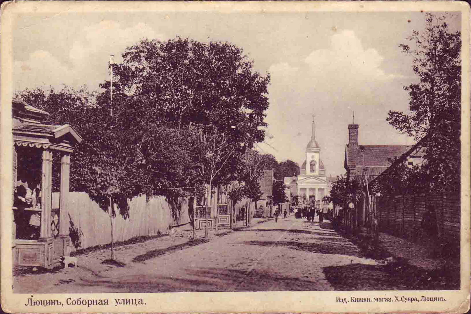 Беларуская (тарашкевіца): Люцын. Саборная вуліца